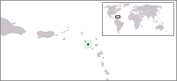 Description:Carte de localisation de l'île Nevis, Saint-Kitts et Nevis Auteur:Rémih